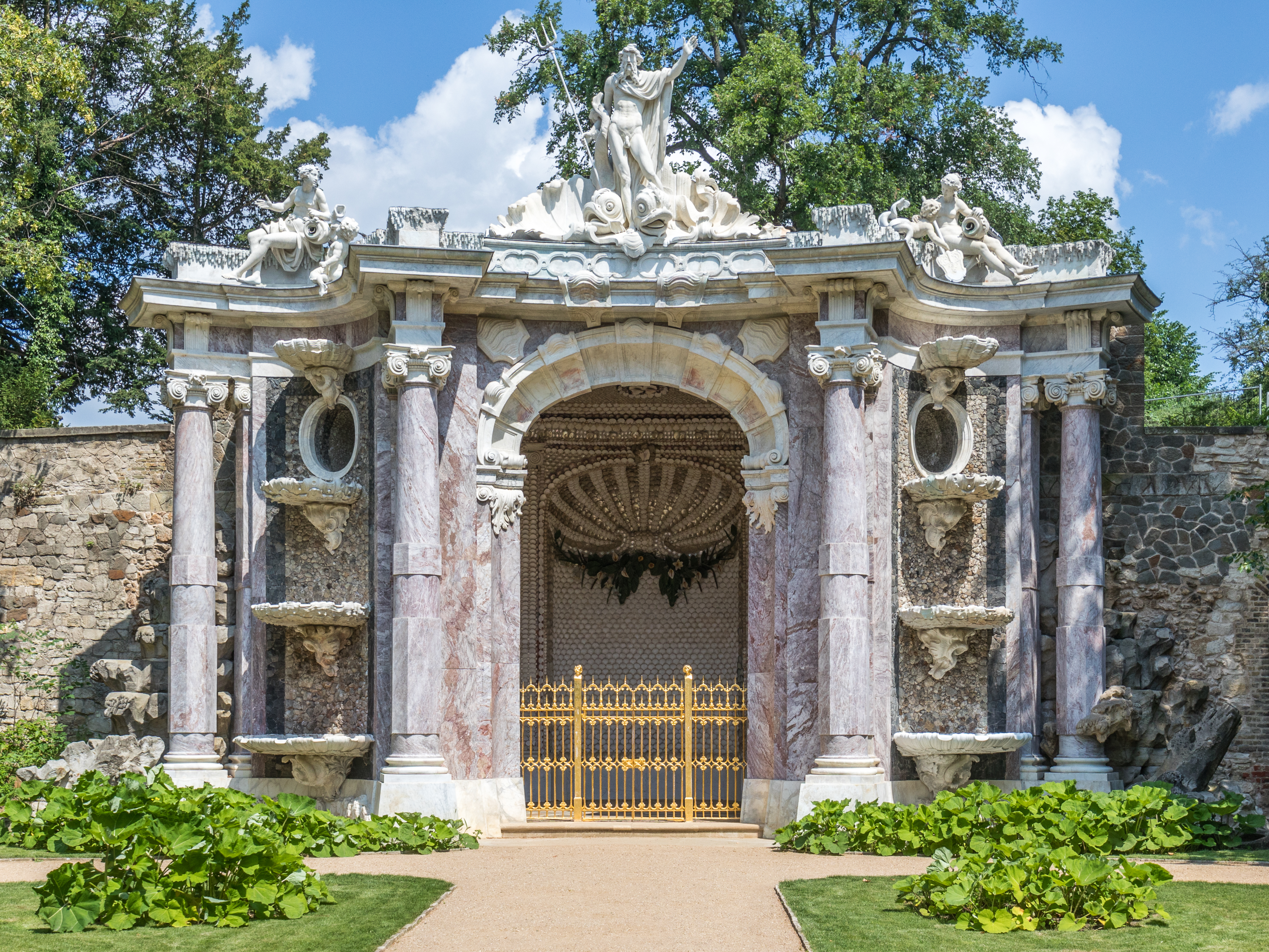 Neptungrotte, Park Sanssouci, Potsdam